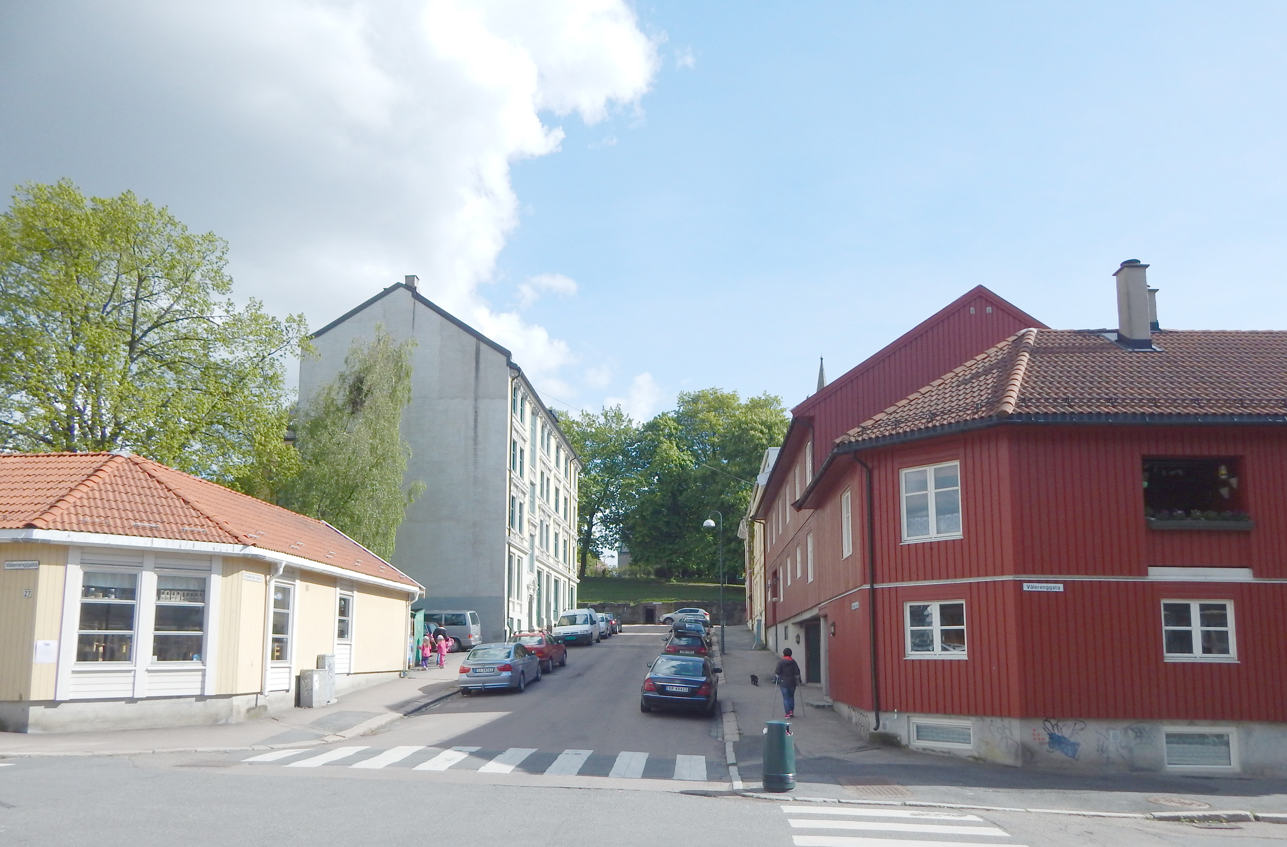 Ingeborgs gate sett fra Vålerenggata